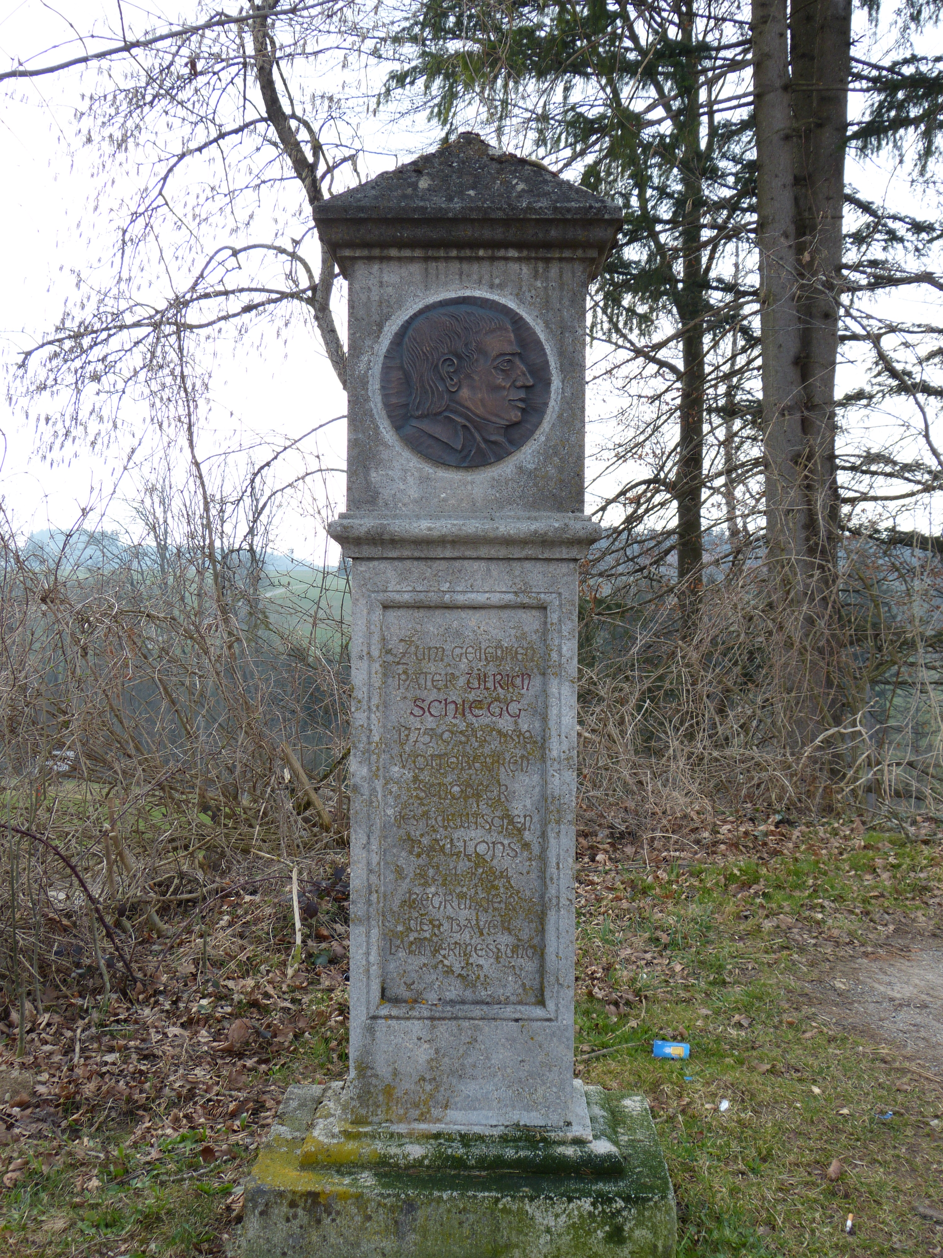 Flurdenkmal, Wolferts, Gemeinde Ottobeuren, Landkreis Unterallgäu, Bayern